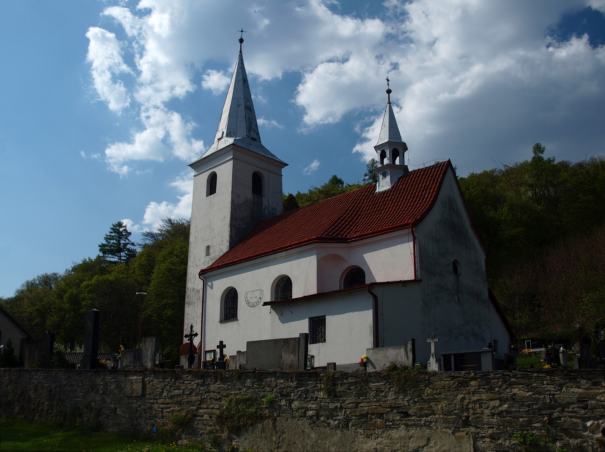 Kostel sv. Havla (Podhoří), Podhoří, Podhoří